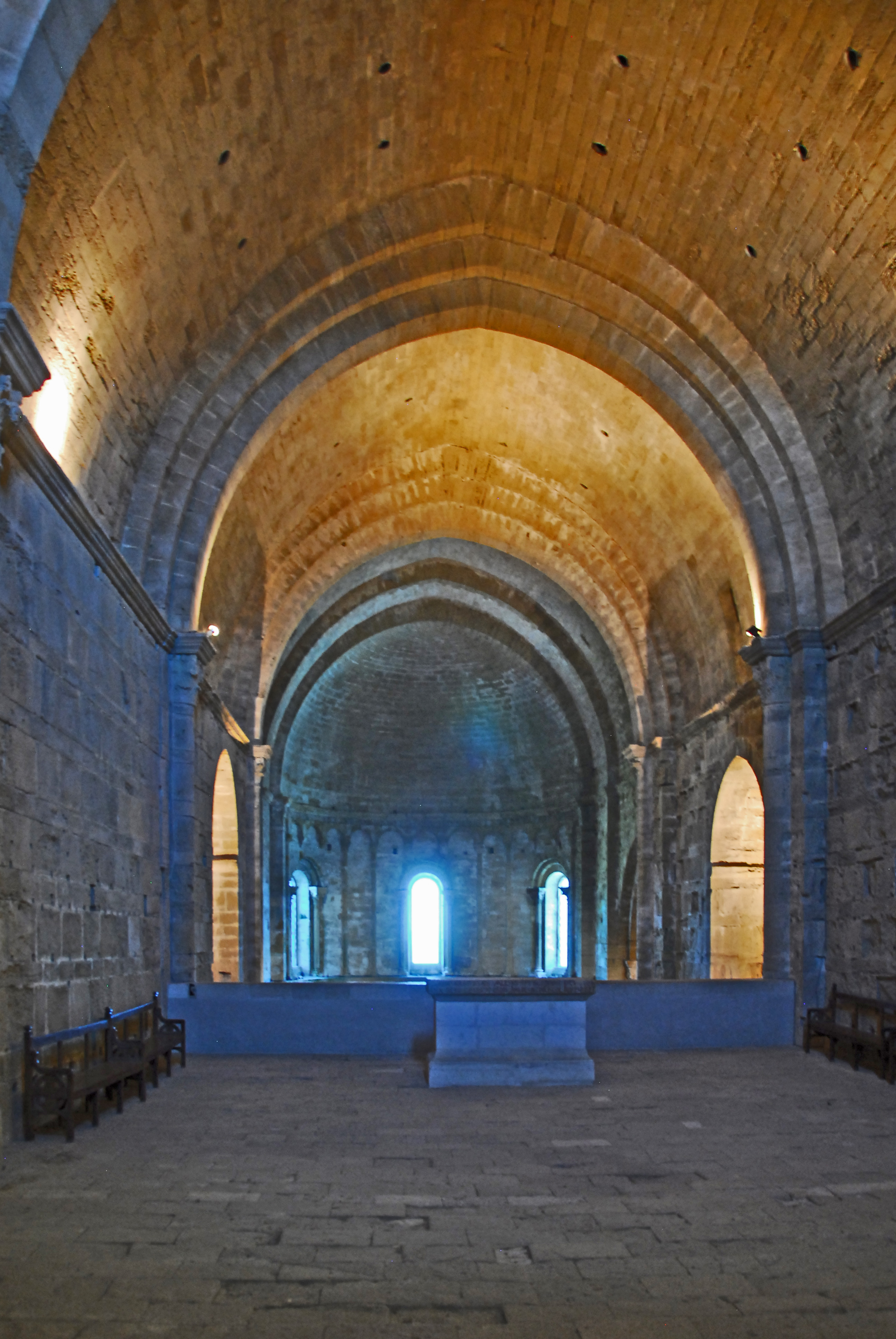 St-Pierre-et-St-Paul de Maguelone, auf Empore zum Chor